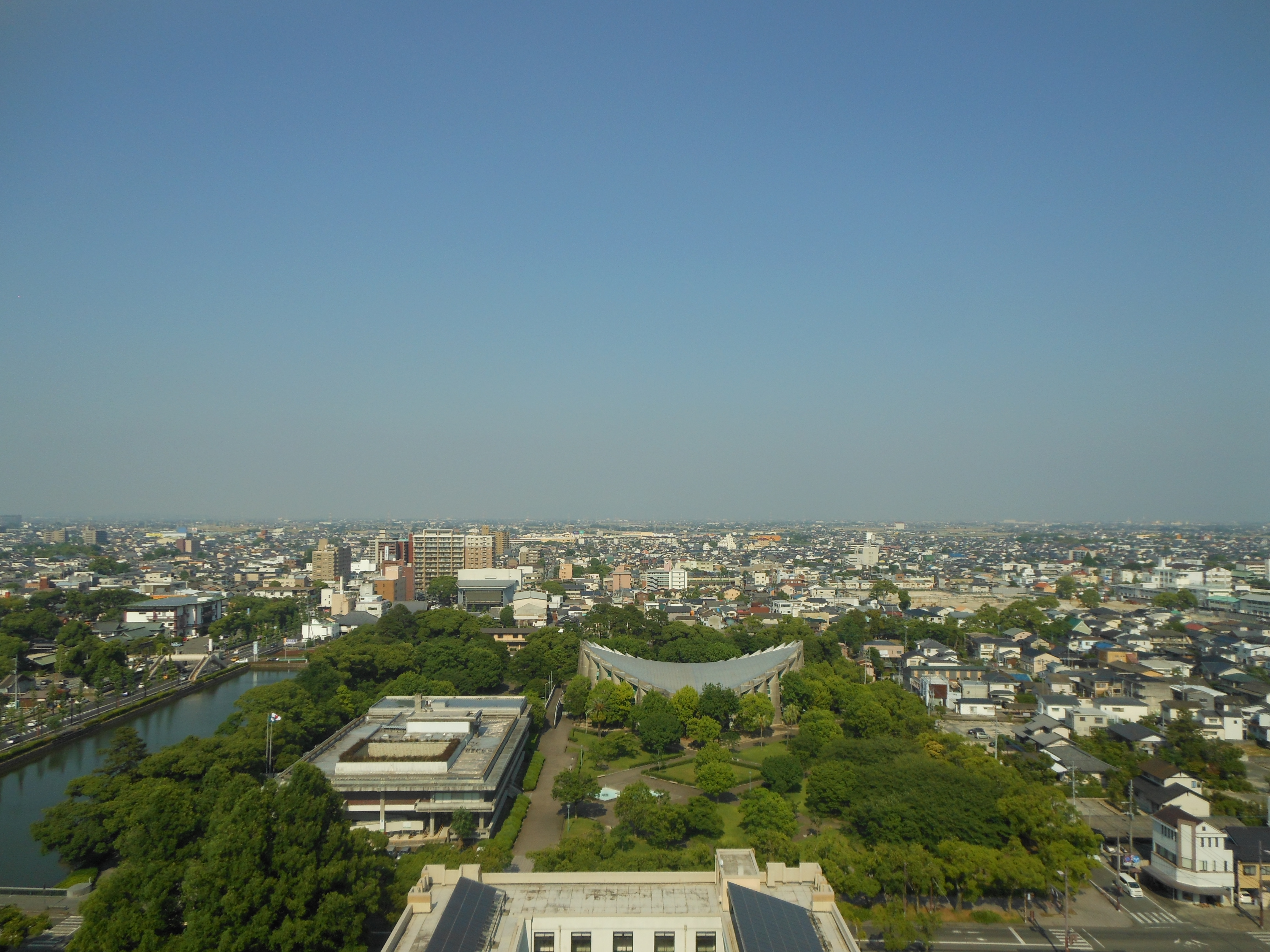 佐賀市中心部の遠景。佐賀県庁屋上展望台より東側を望む。